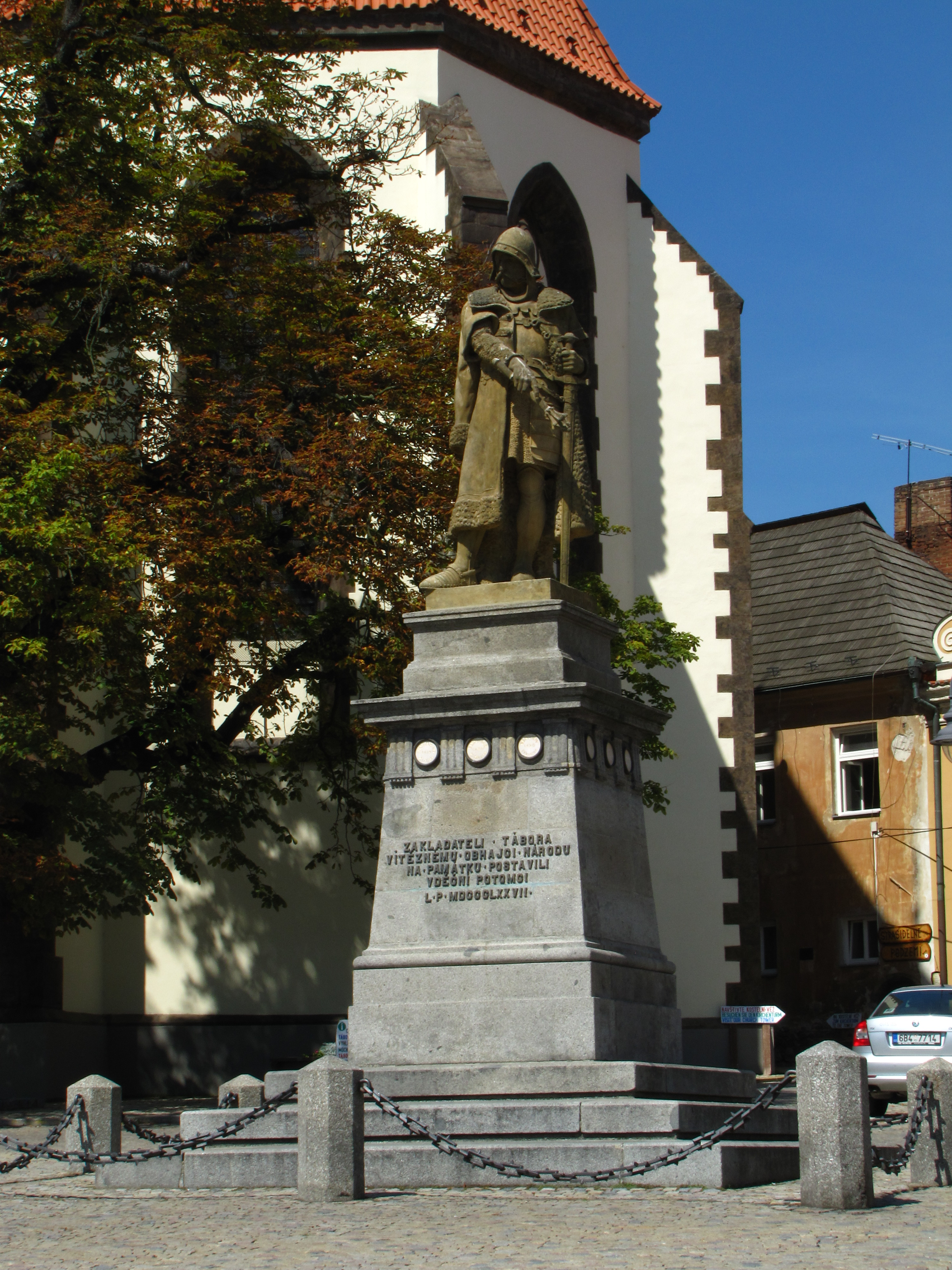 Pomník Jana Žižky z Trocnova (Tábor), nám. Žižkovo, Tábor